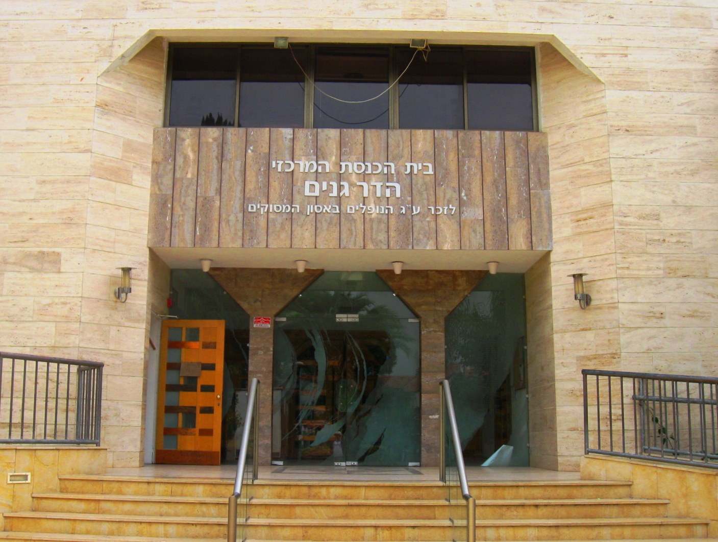 בית הכנסת לזכר הרוגי אסון המסוקים רישיון נוצר על ידי משתמש:Daniel Ventura